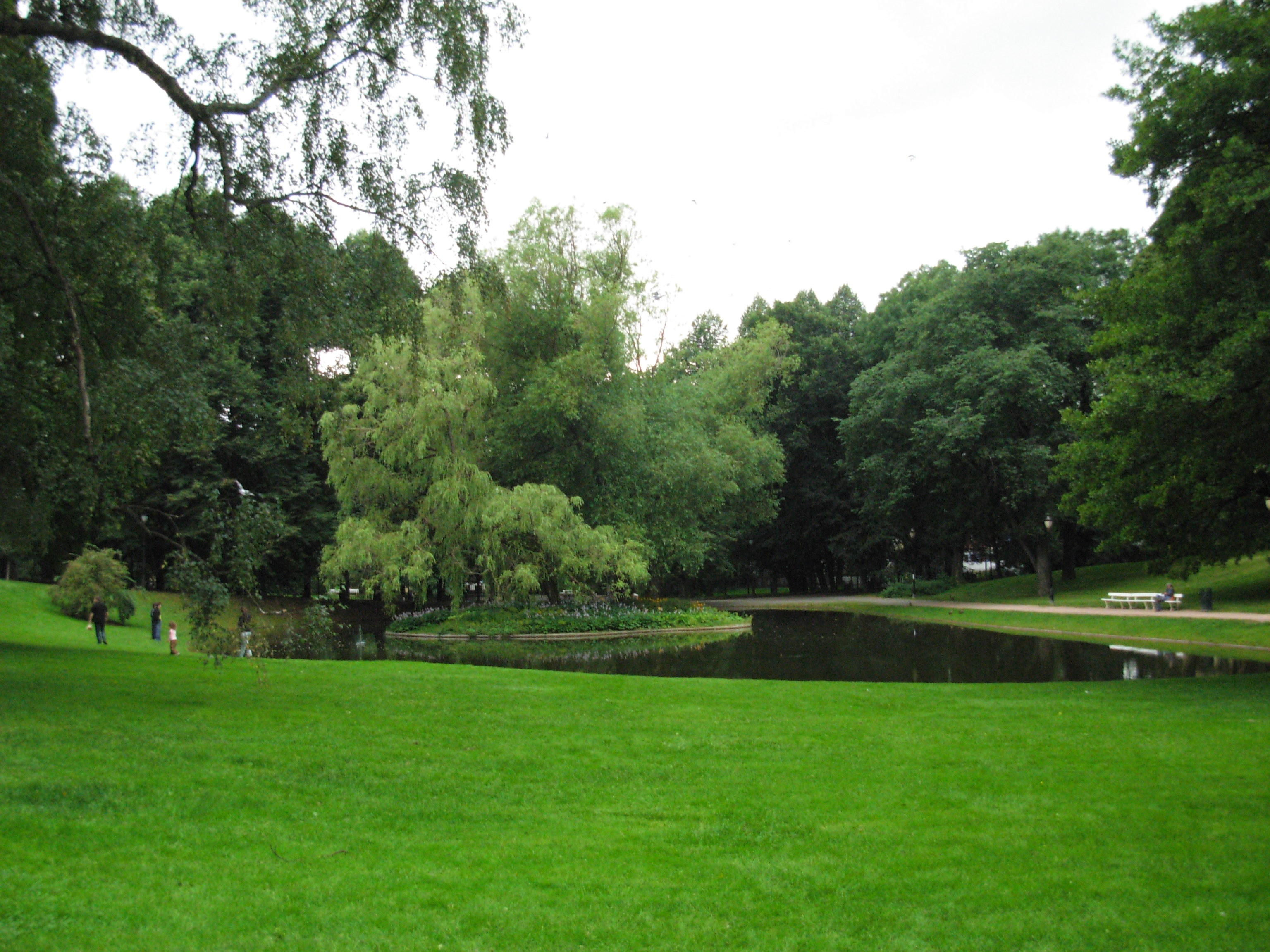 Slottsparken, dammen Kongespeilet